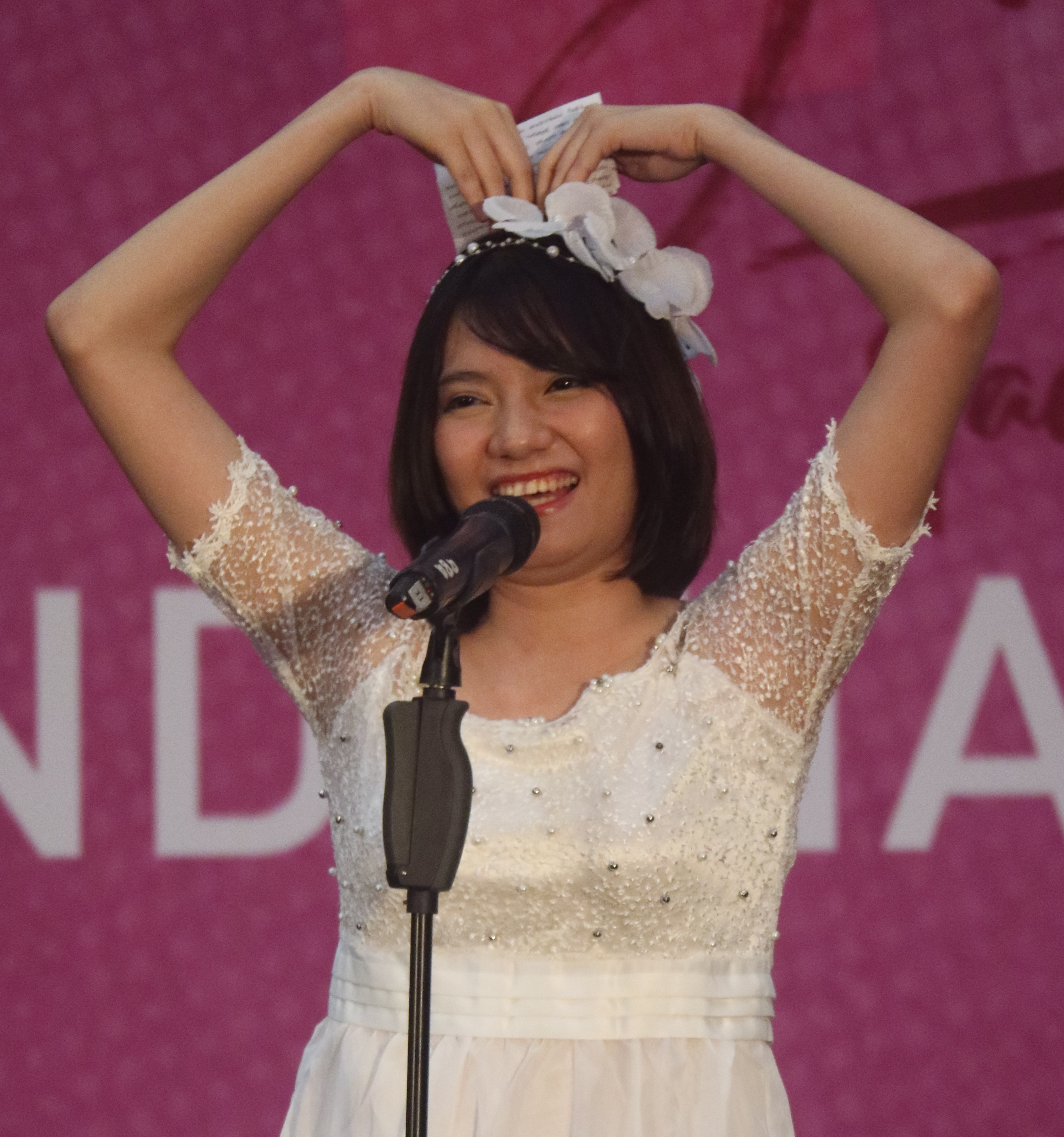 Ruchan at TR HSF